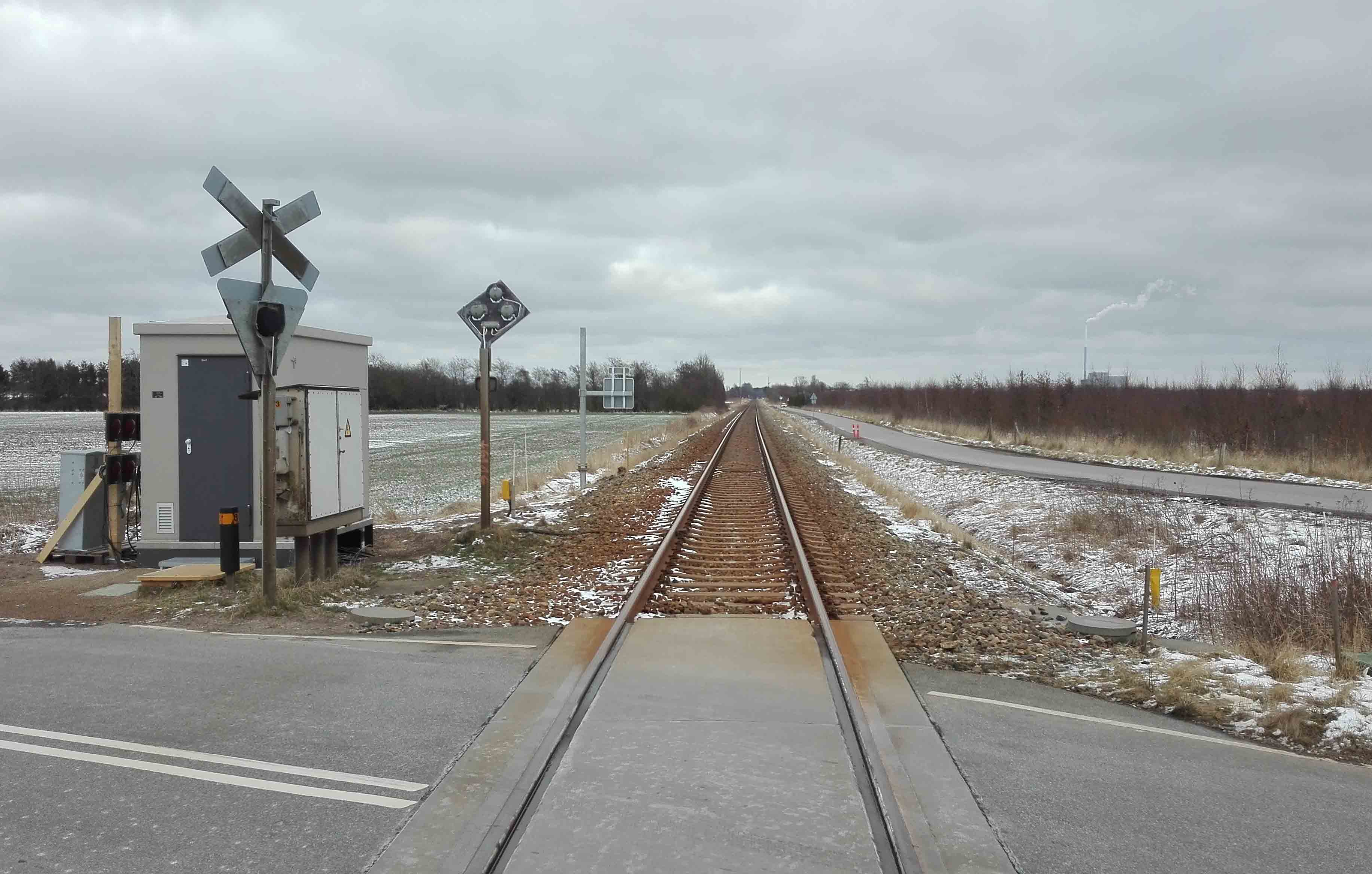 Elling Trinbræt 1929-55 hvor Vendsysselbanen krydser Mariendalsvej